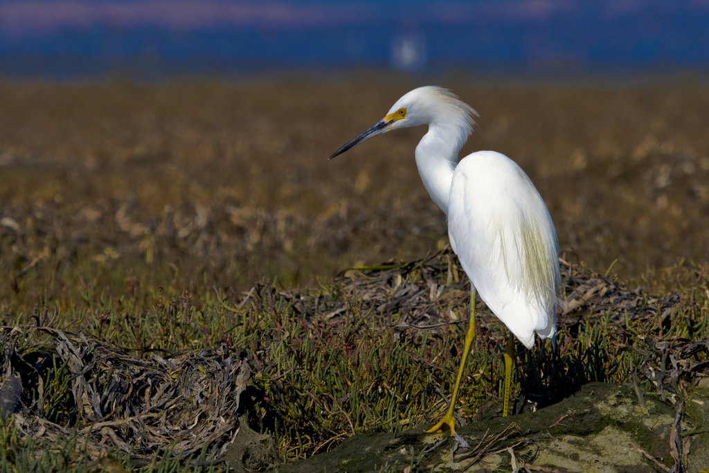 Aigrette neigeuse Egretta thula